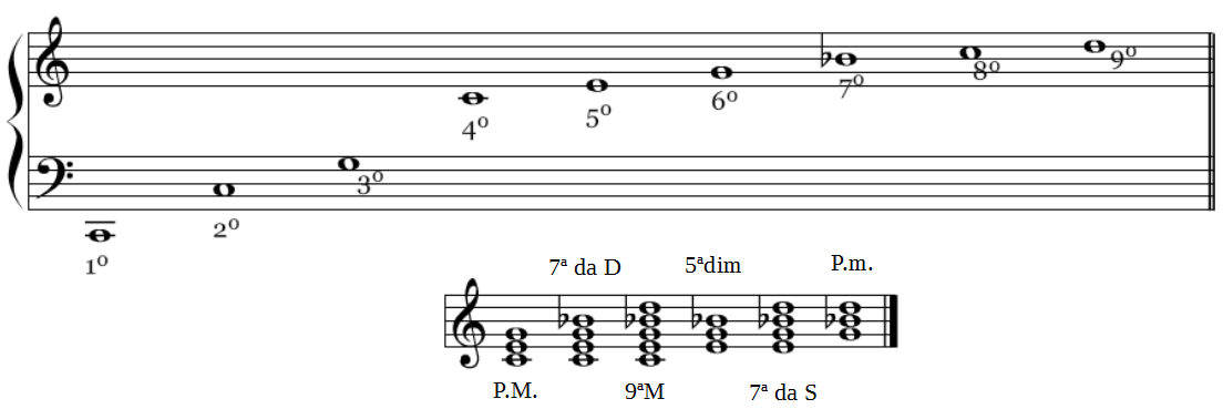 Formação de acordes a partir da série harmônica com o Dó1 como som gerador.